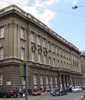 Филолошки факултет са Студентског трга